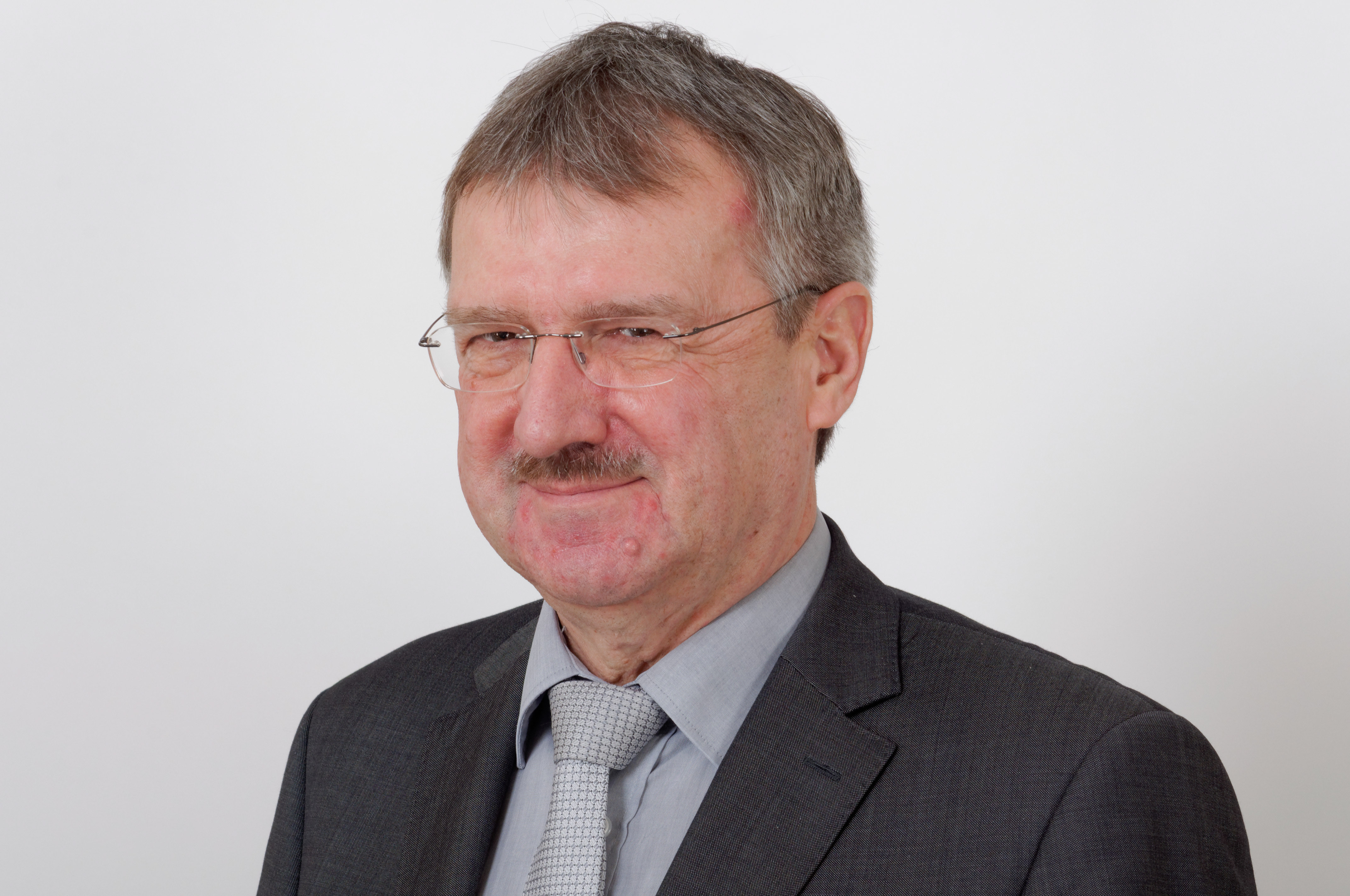 Landtagsprojekt Hessen